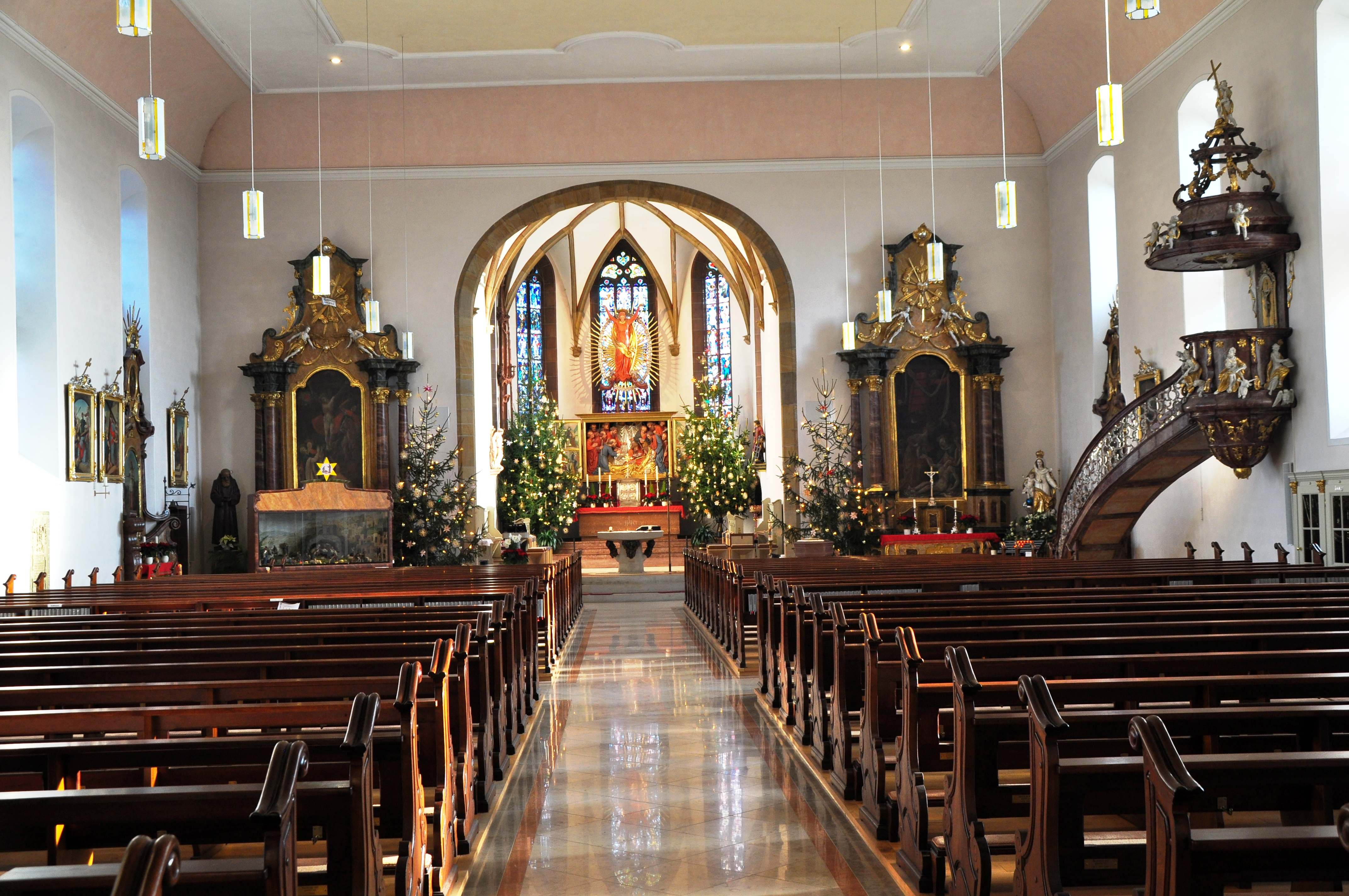 Kirchenschiff, Kath. Pfarrkirche St. Maria Himmelfahrt Herxheim